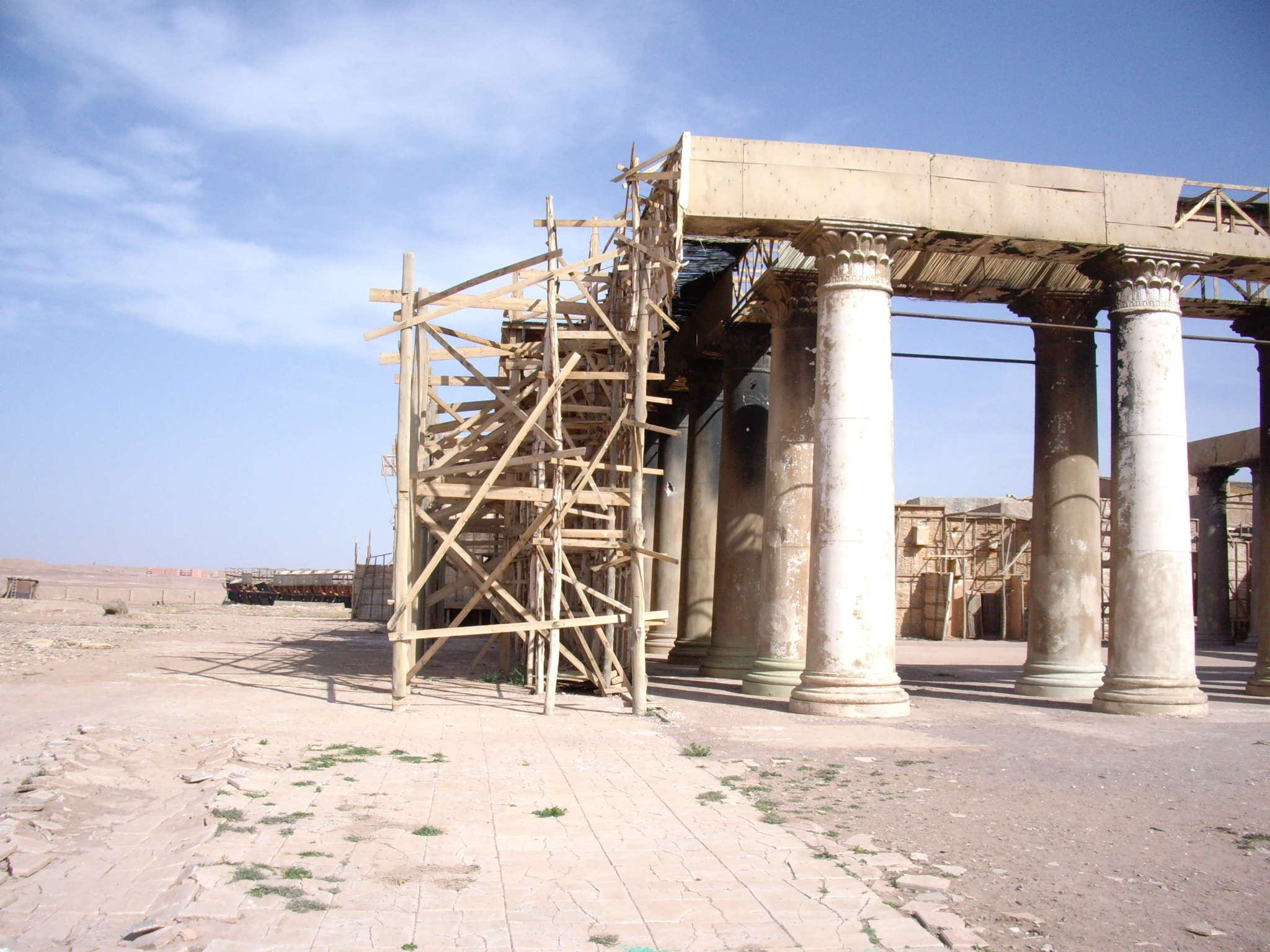 Decorat per pel3lícules històriques